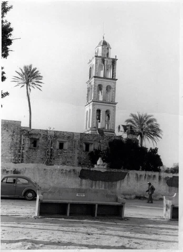 San Pedro Yeloixtlahuaca 1980